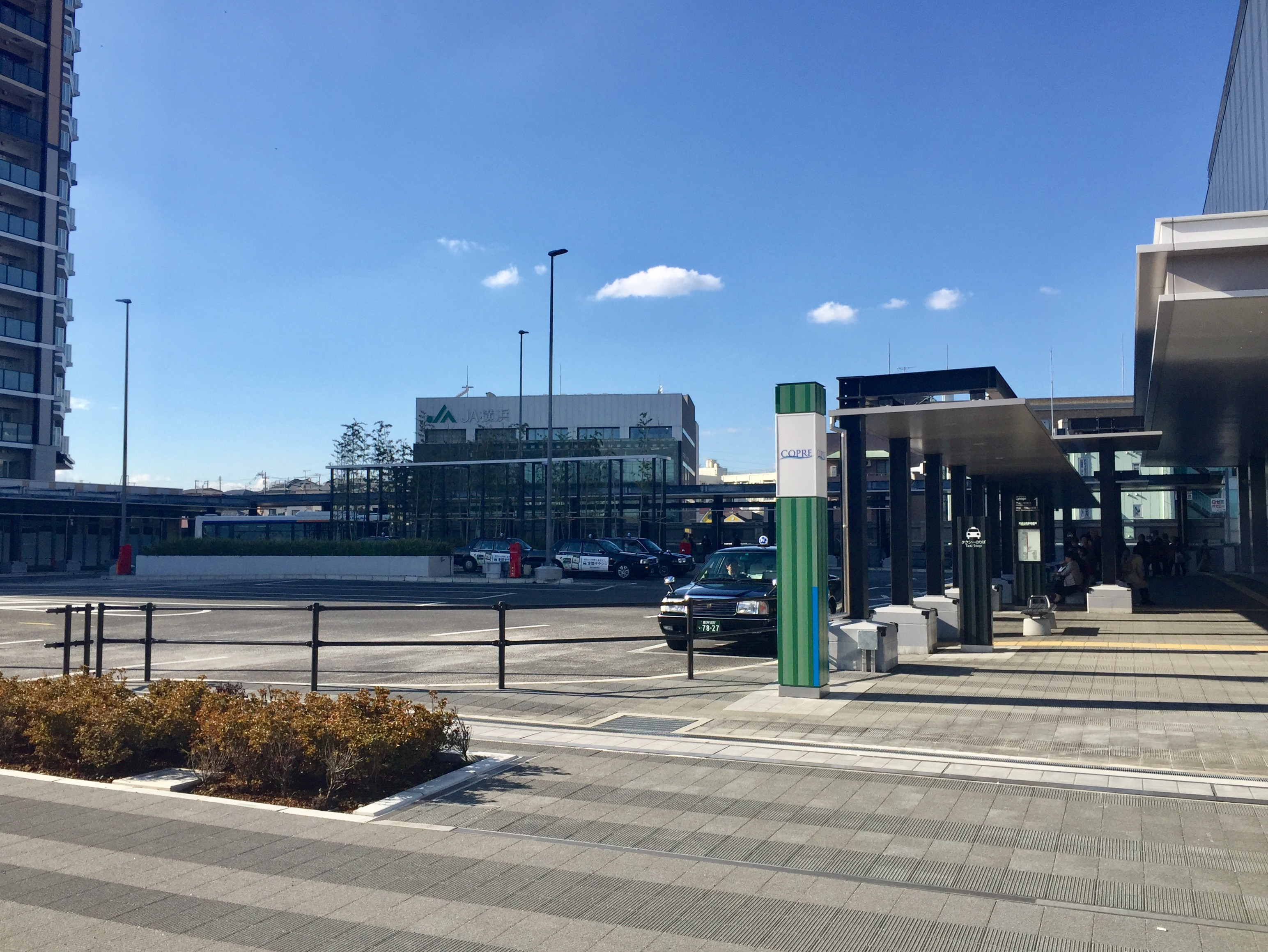 二俣川駅南口交通広場（2016年12月供用開始）。